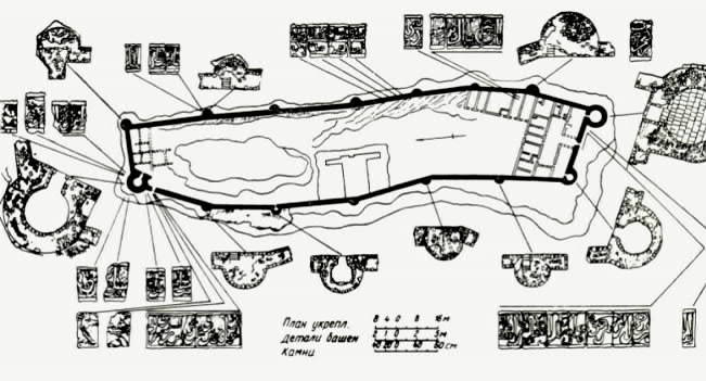 Bayıl qəsrinin planı